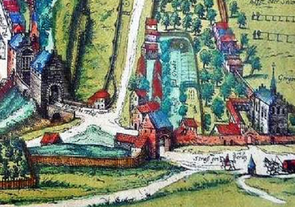 Fragment Alten Stettin-2